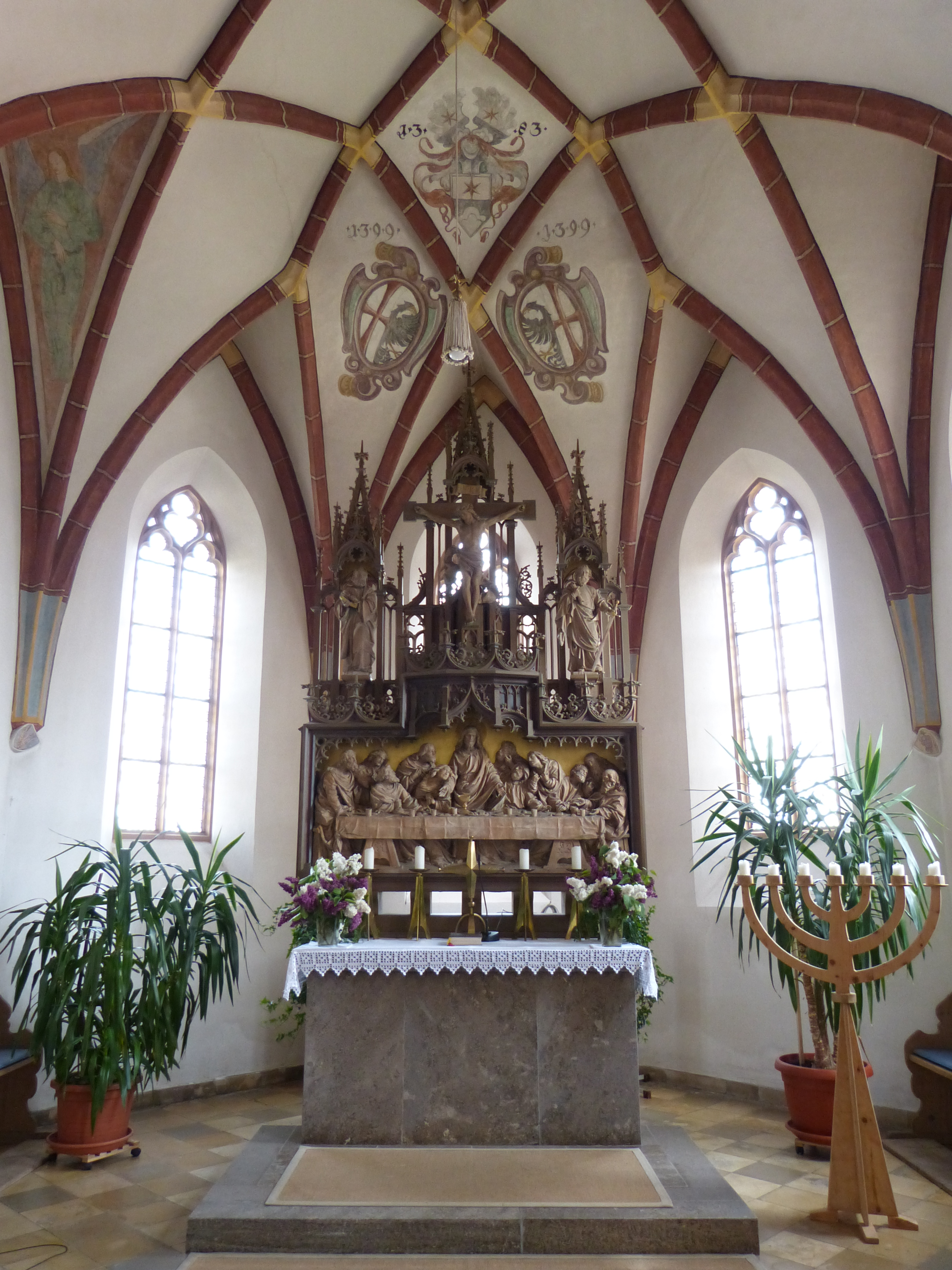 Unser Lieben Frauen, Lauben, Landkreis Unterallgäu, Bayern